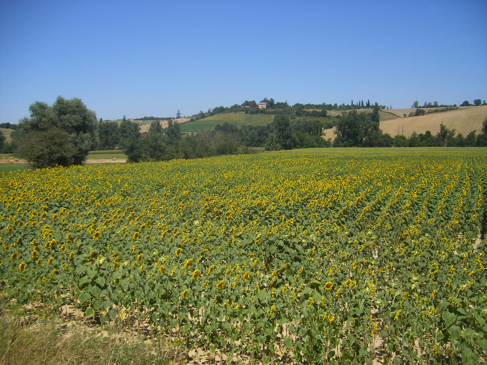 Landscape near Labéjeau (commune Le Born)